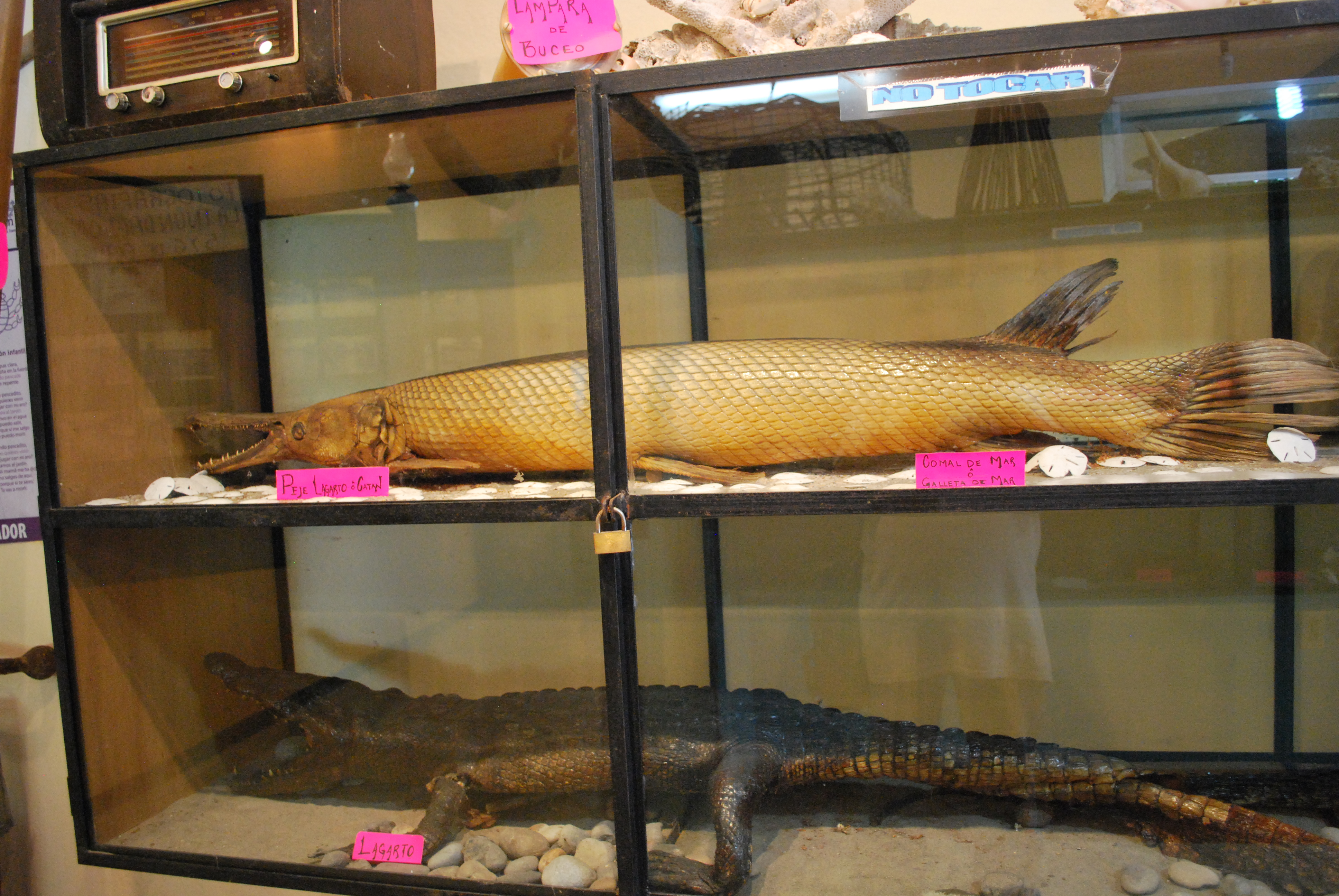 pejelagarto fish and crocodile on display at the marine museum in Tecolutla, Veracruz